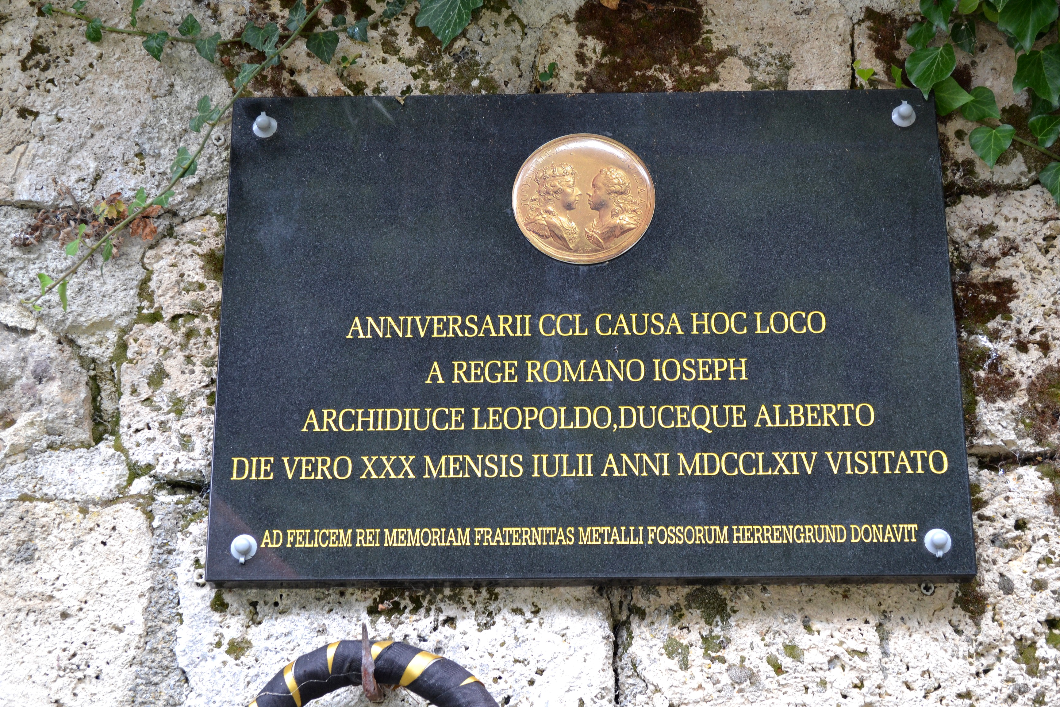 Špania Dolina (okr. Banská Bystrica); pamätná tabuľa pri vchode